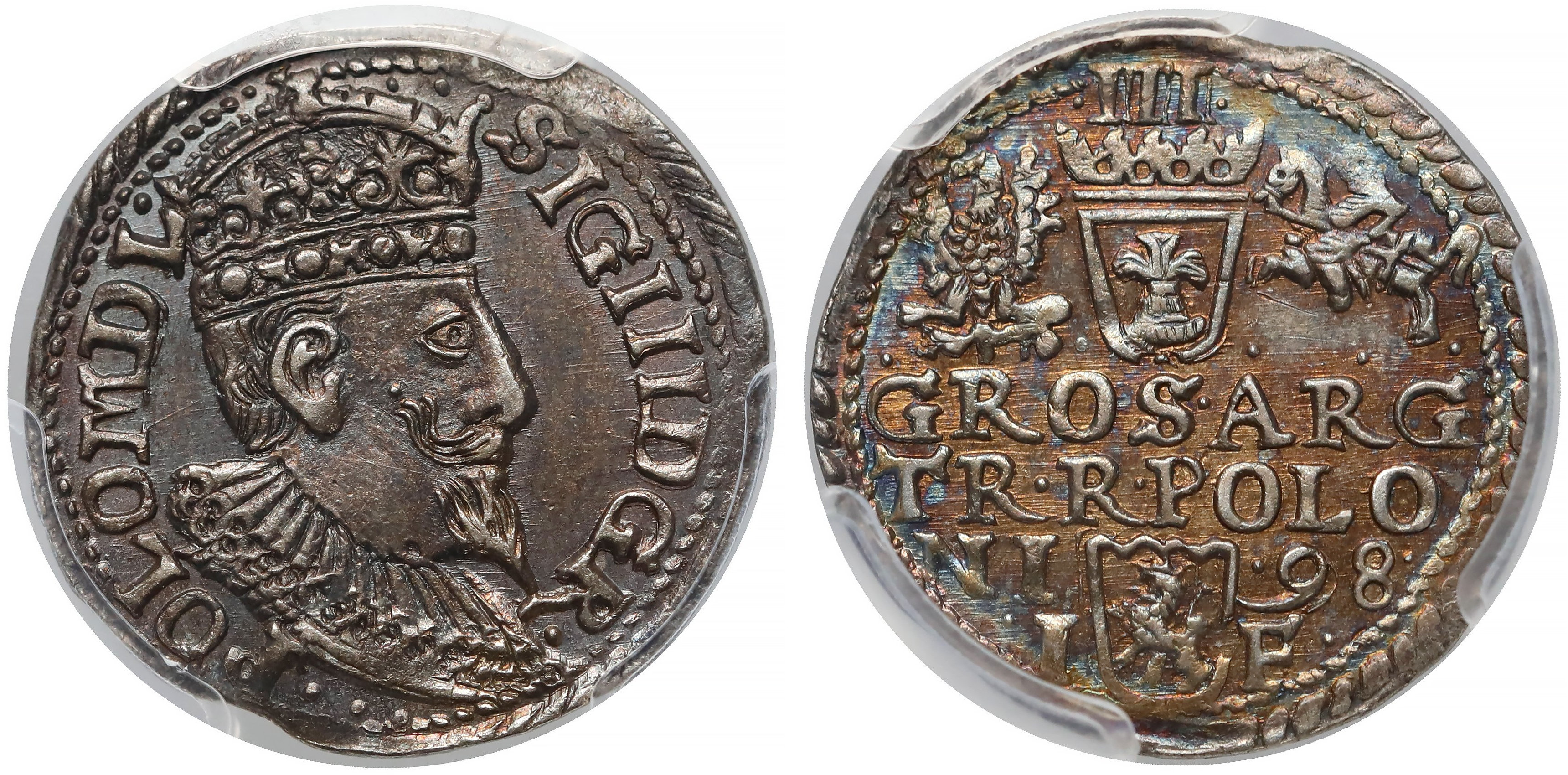 Trojak 1598 Olkusz